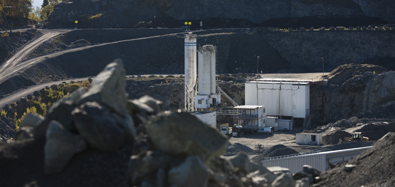 Franzefoss Pukk avdeling Steinskogen (Bærums Verk)